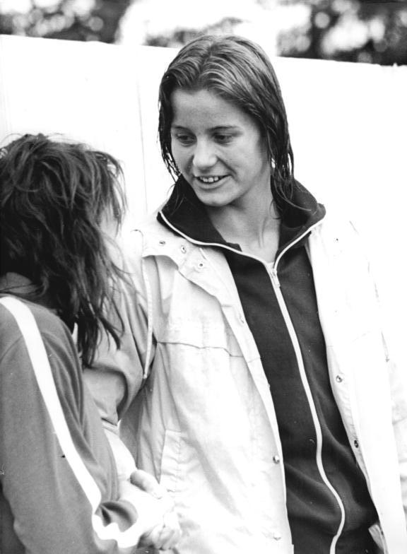 Kornelia Ender ADN-ZB Koch 4-7-74-Rostock: 25. DDR-Schwimm-Meisterschaften-Kornelia Ender (r.) vom SC Chemie Halle verbesserte ihren eigenen Weltrekord über 100 m Freistil von 57,54 auf 57,51 s. Herzlich gratuliert ihr Angela Franke zu diesem Erfolg.